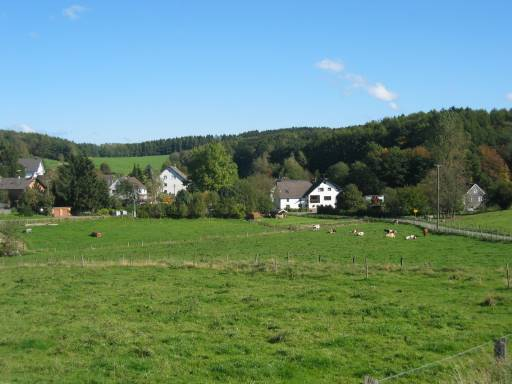 Ortsansicht von Haan (Gemeinde Nümbrecht)